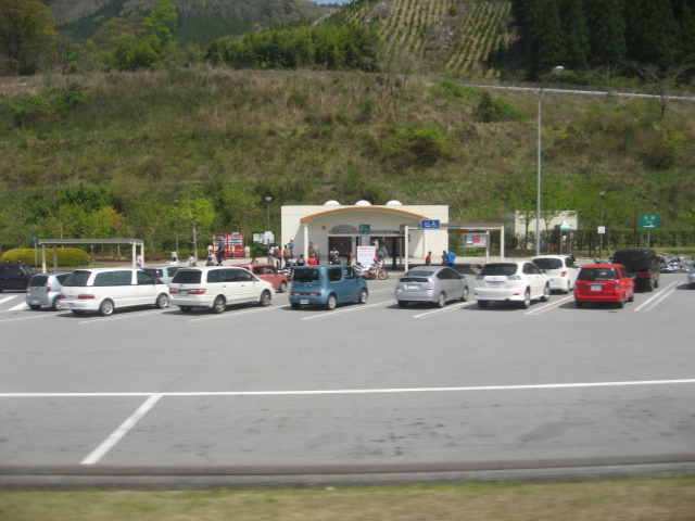 水分パーキングエリア下り線